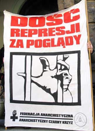 Pikieta poznańskiego ACK pod Sądem Rejonowym/Anarchist Black Cross in front of court